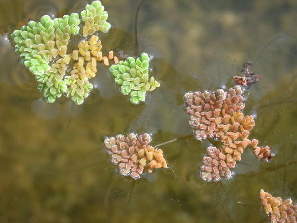 Azolla pinnata à Antananarivo